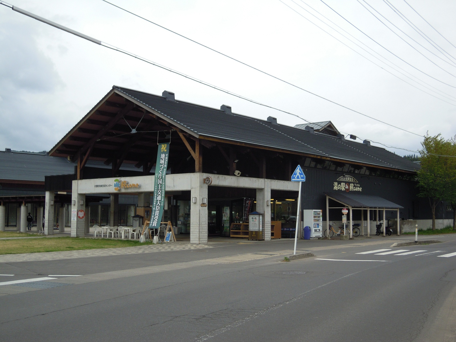 青森県南津軽郡大鰐町にある大鰐町地域交流センター「鰐come」の外観